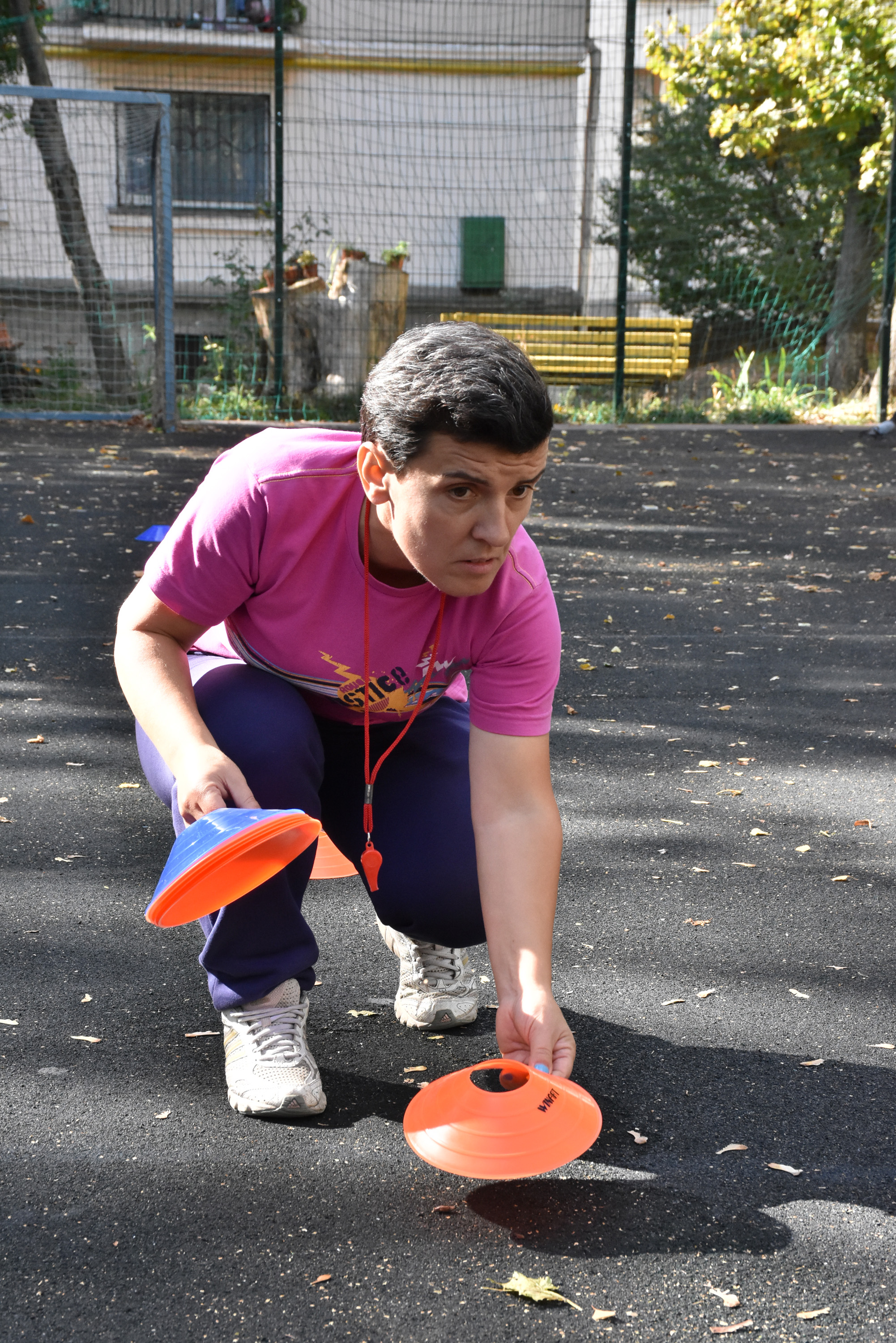 «Веселі старти» для іноземних студентів Тернопільського державного медичного університету імені І. Я. Горбачевського на спортивному майданчику Тернопільського фіздиспансеру на вул. Старий Ринок проводить українська спортсменка, тренерка, громадська діячка Лілія Проць.